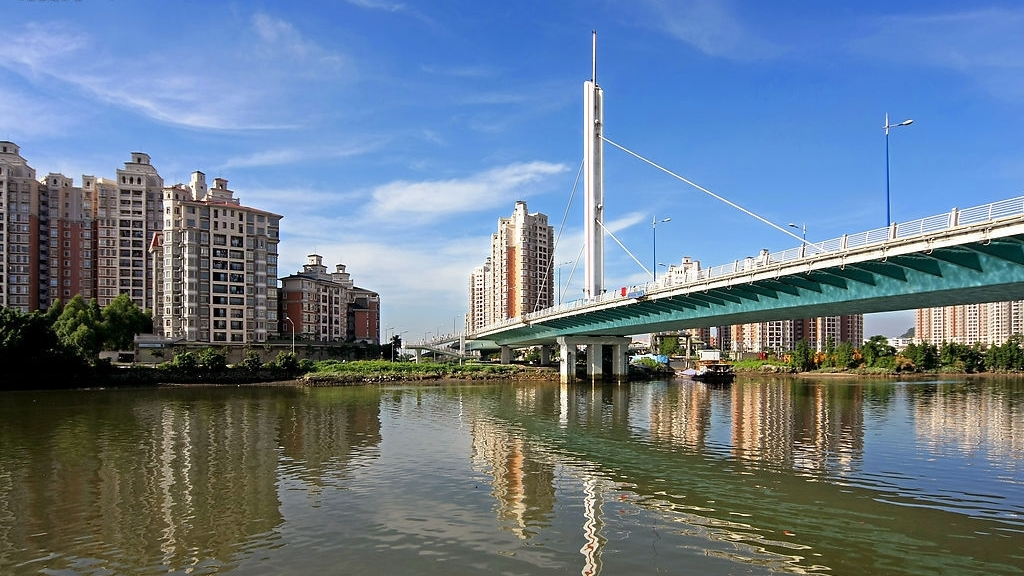 西丽大桥2004